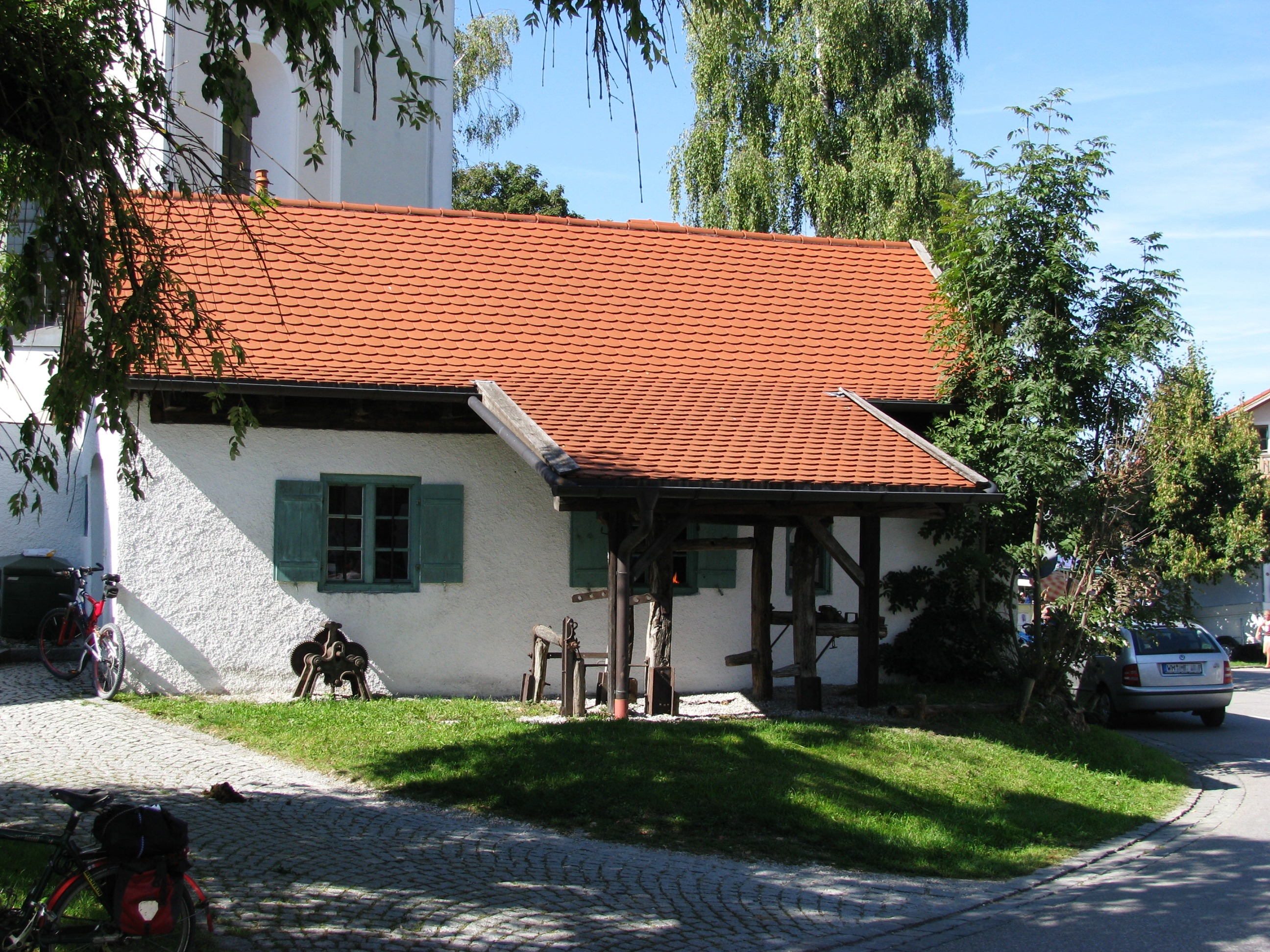 Ehemalige Dorfschmiede in Gelting, mit Vorführung am Tag des offenen Denkmals 2012.This is a photograph of an architectural monument.